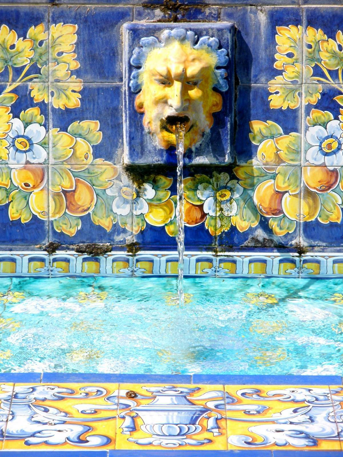 Jardines del Prado, en Talavera de la Reina (Toledo)